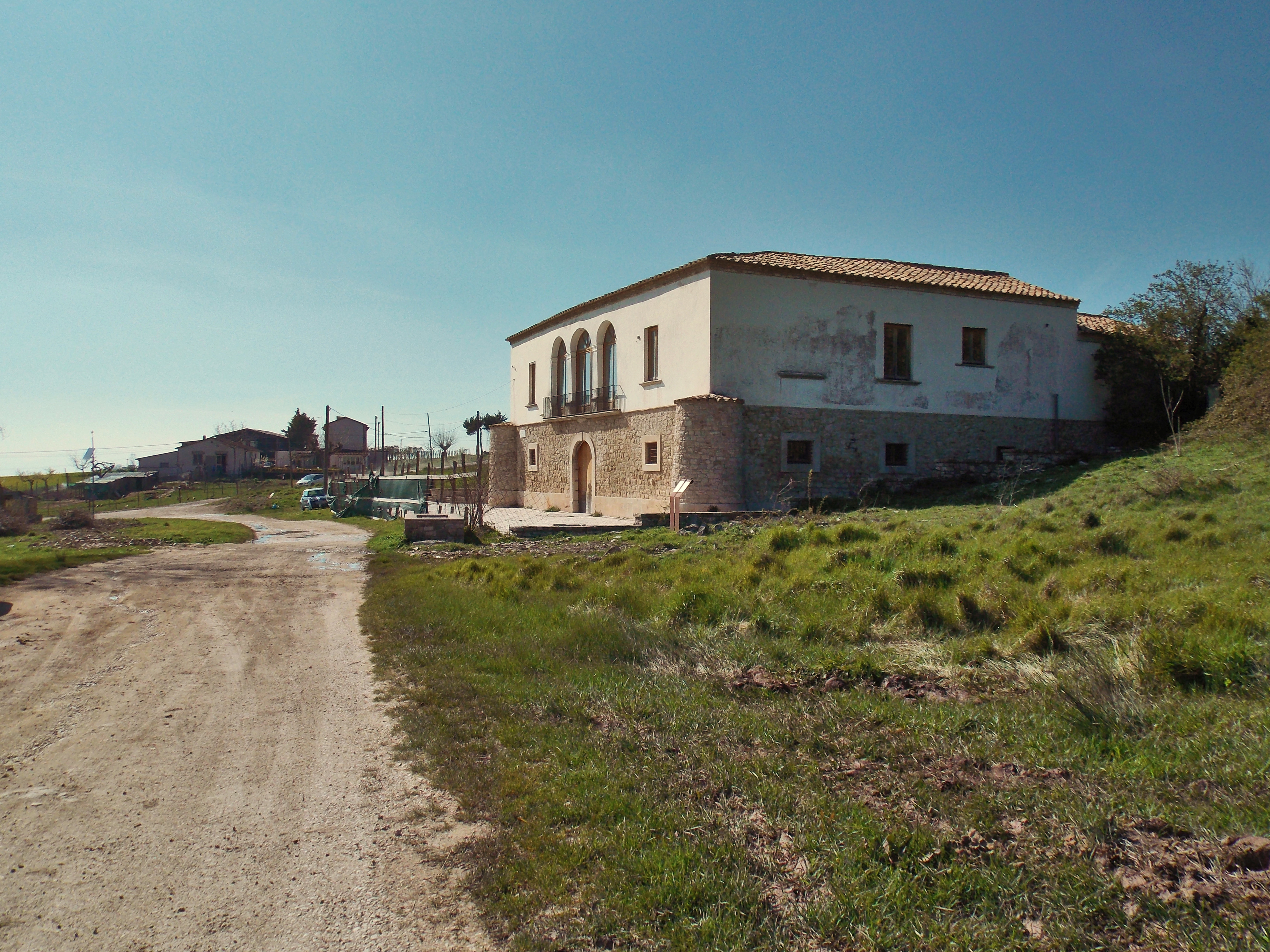 Taverna di Monte Chiodo lungo il tratturo Pescasseroli-Candela a Buonalbergo, in provincia di Benevento